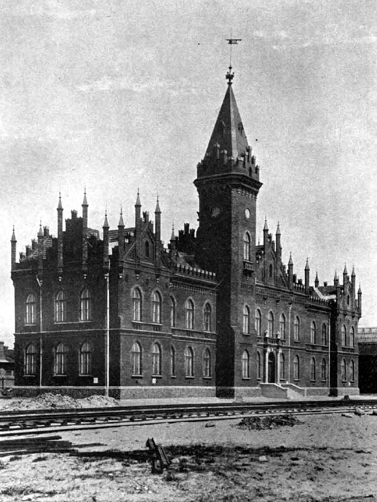 Zakłady Naprawy Taboru Kolejowego w Pruszkowie